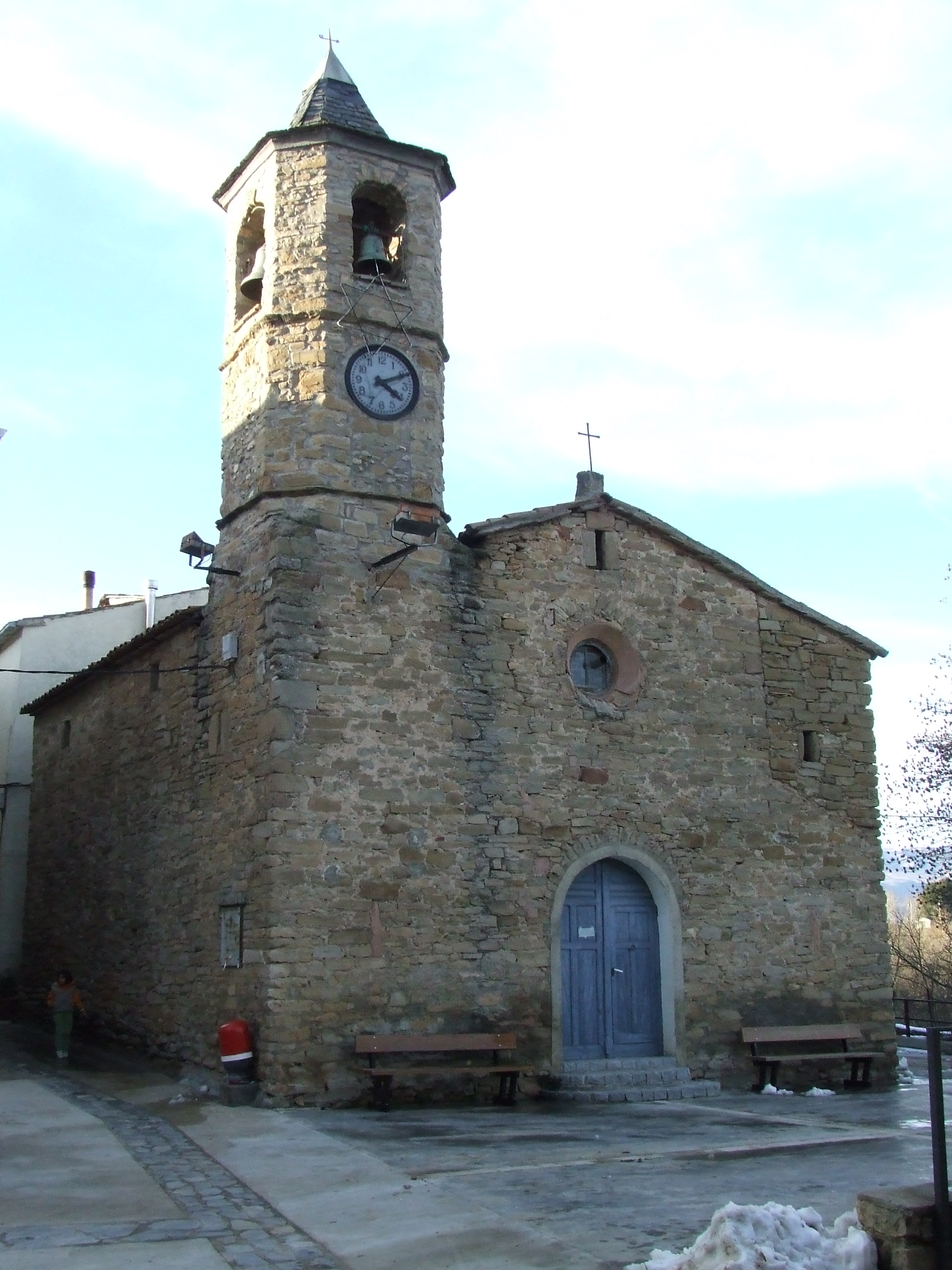 L'església parroquial de Gavet (Sant Serni, Gavet de la Conca, Pallars Jussà)